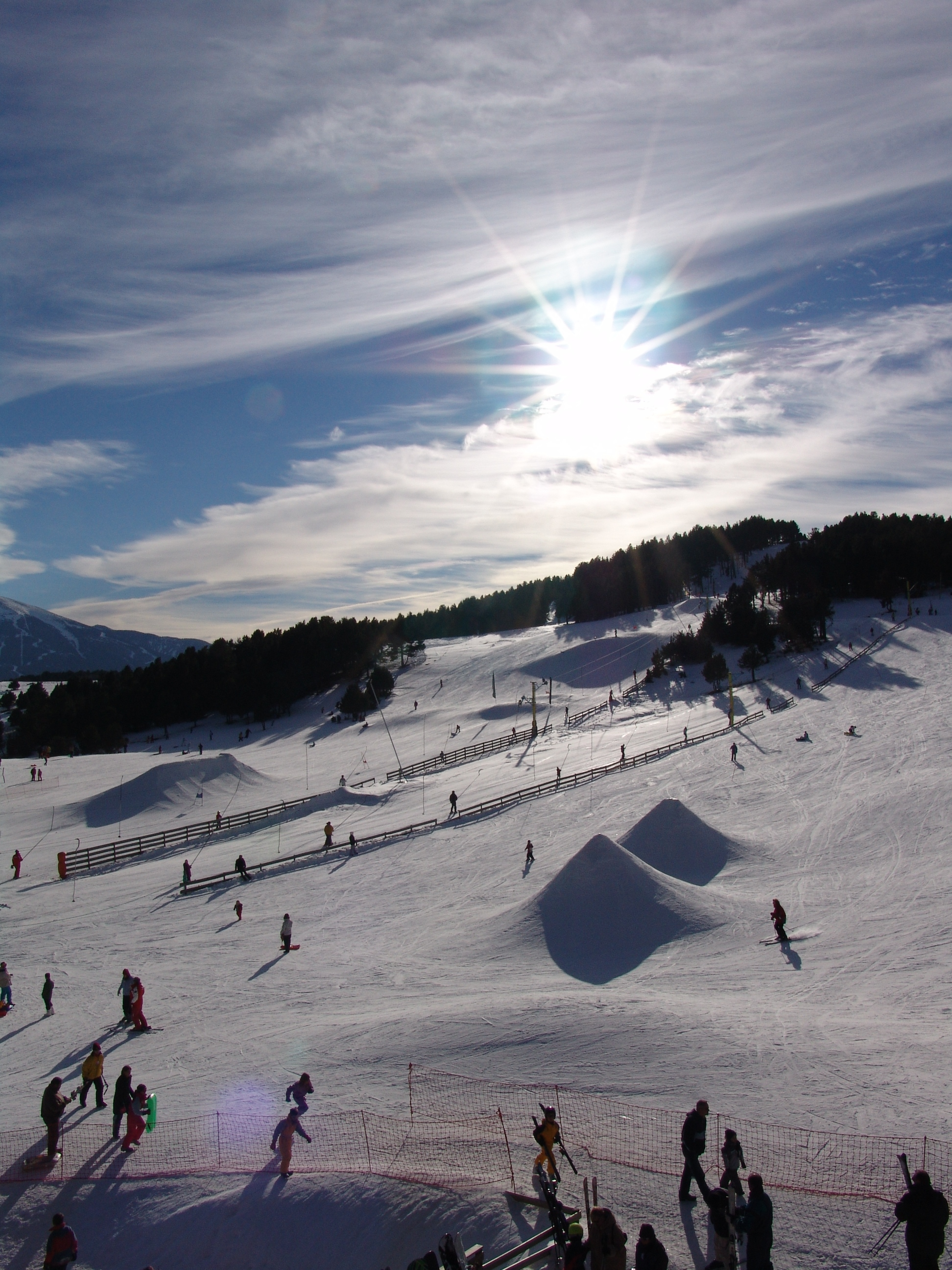 La Quillane, particule reconnaissable : station de ski créée par un famille pour les familles avec location de matériel, restauration, pêche à la truite, base de loisirs.